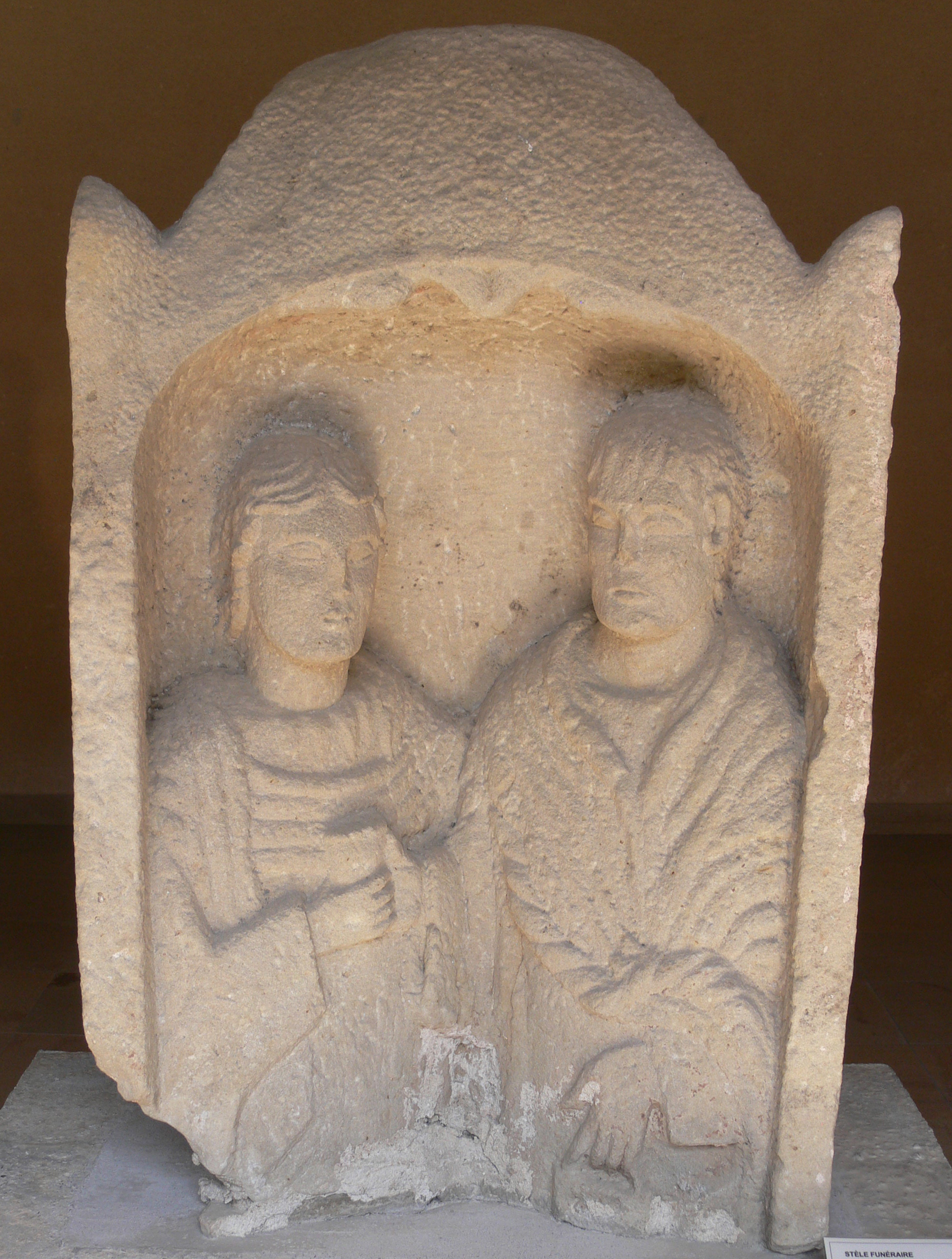 Stèle funéraire d'époque gallo-romaine provenant de Corre (Haute-Saône). Grès blanc. Vesoul, musée Georges-Garret, inv. D 963.3.4, dépôt de la Salsa (société savante locale), 1963